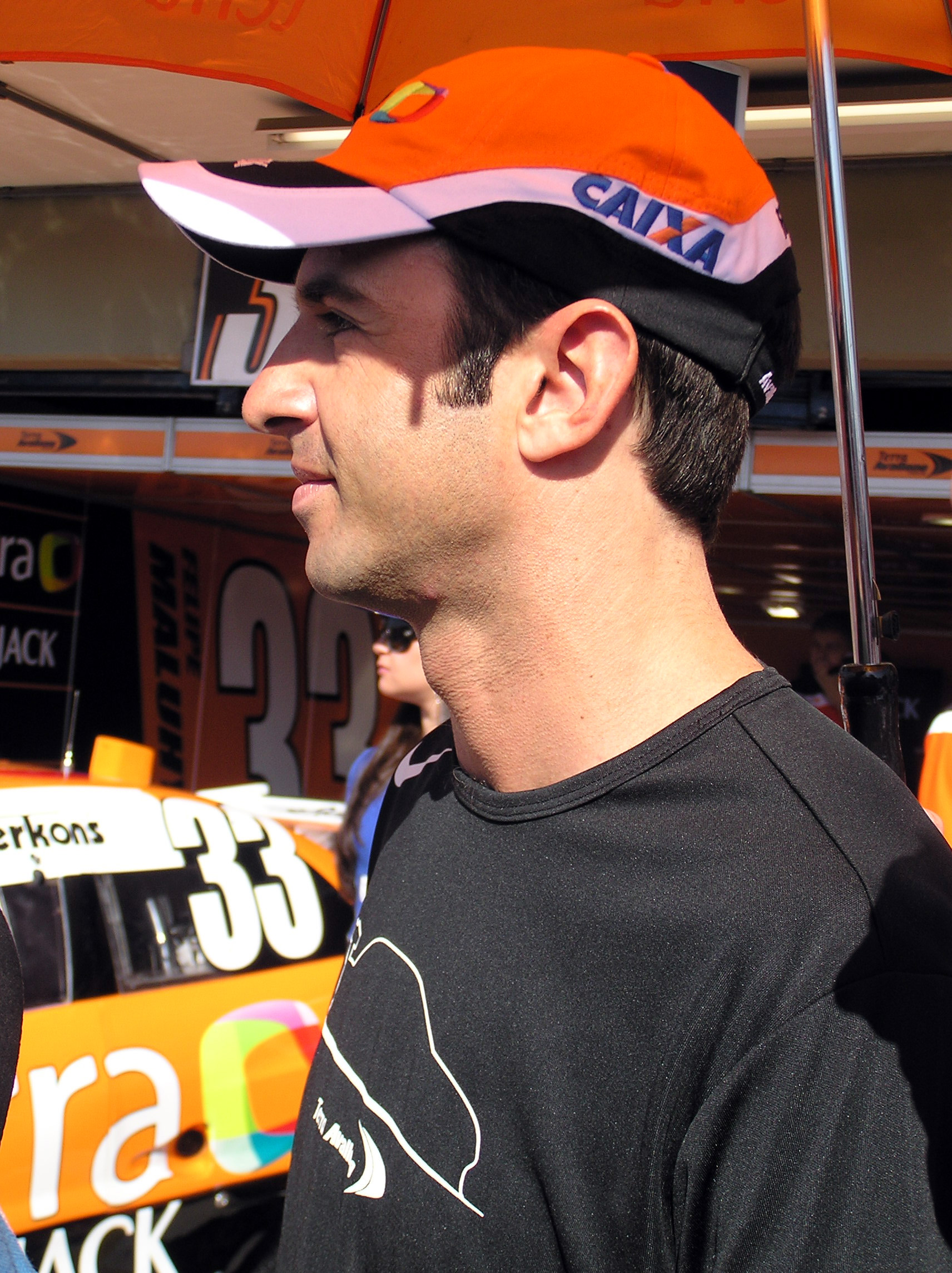 Christian Fittipaldi (Terra-Avallone Motorsport) at Stock Car Brasil in 2006.